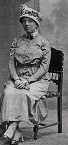 Ольга Михайловна Басараб (1889—1924) — активистка украинского национально-освободительного движения, разведчица.